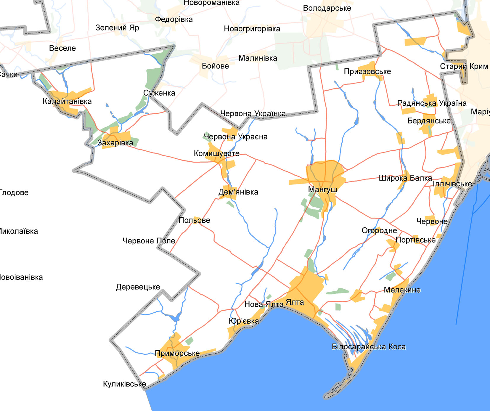 Map